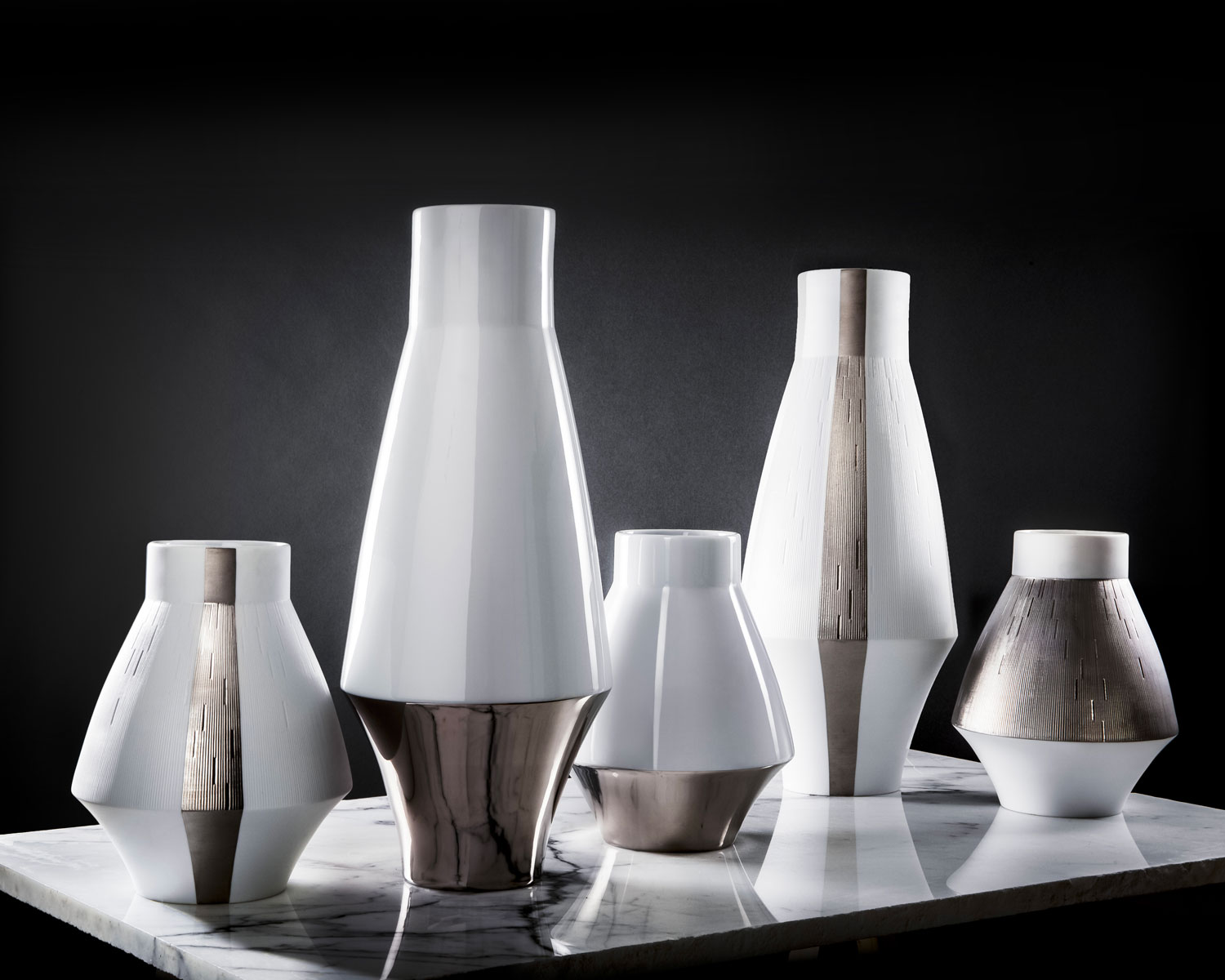 Vases Haviland collection infini créées fabriqués à Limoges France en porcelaine